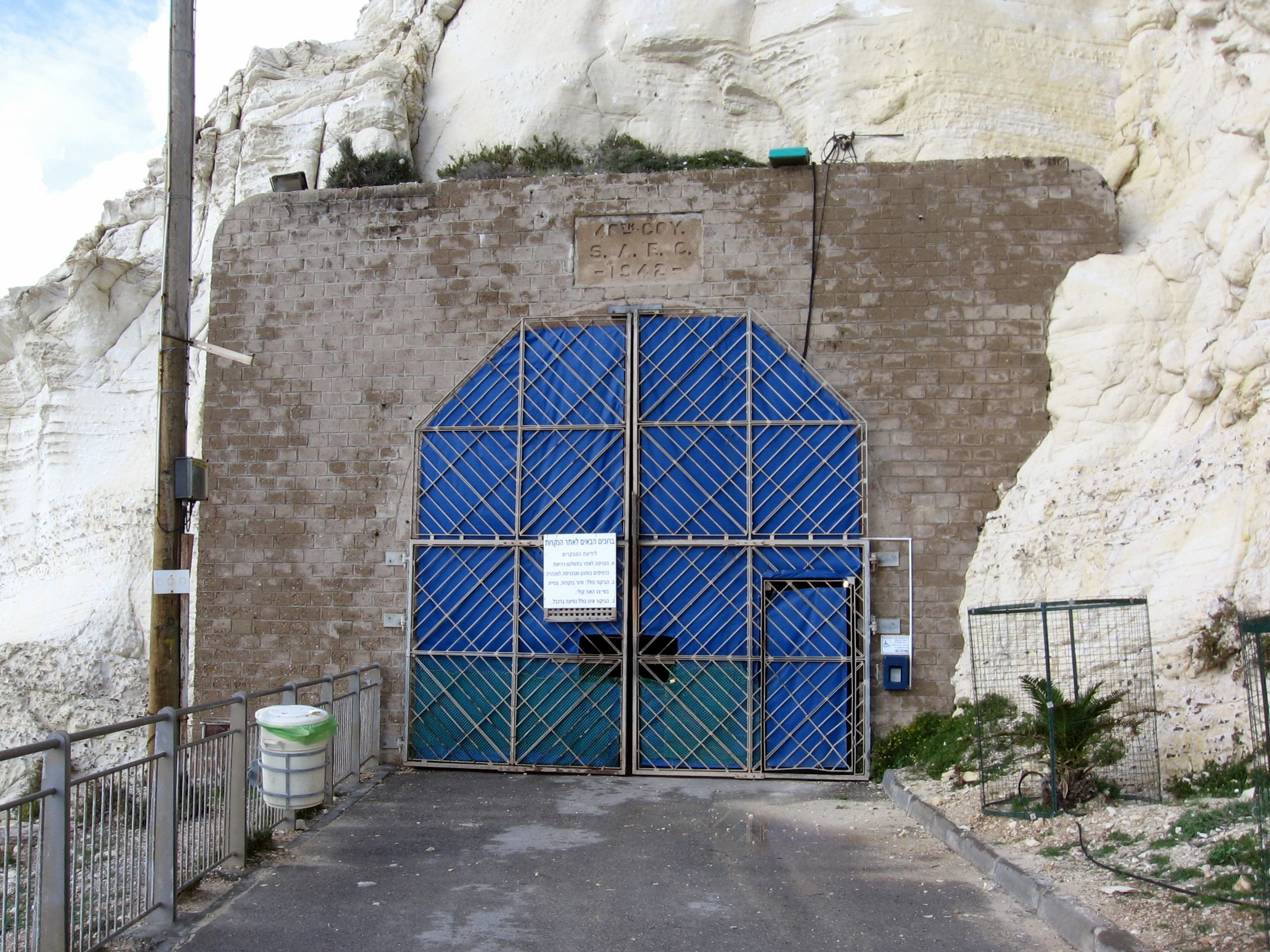 Bývalý vjezd do dnes již nepoužívaného silničního tunelu vyhloubeného v Roš ha-nikra